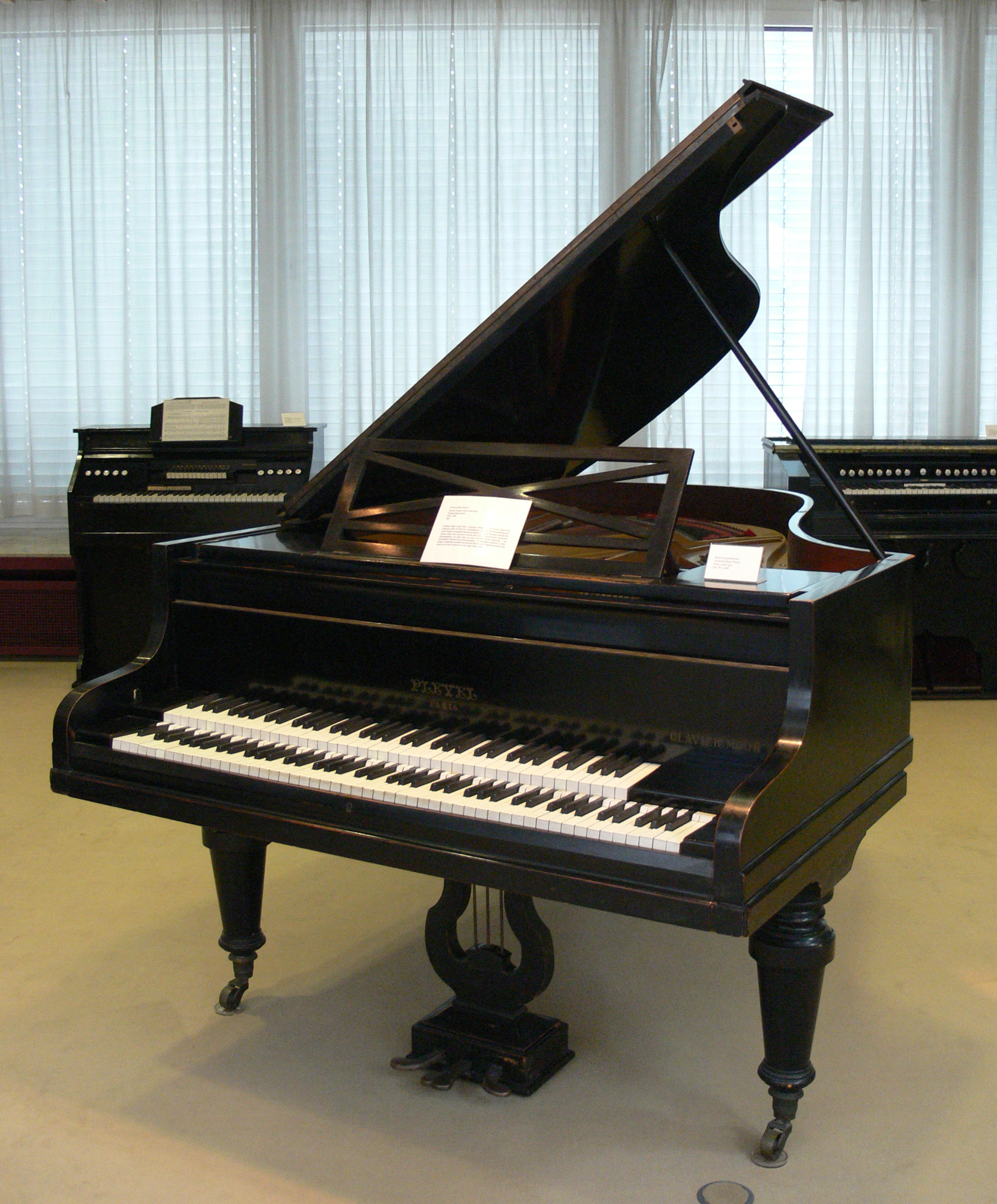 Doppelklavier nach Emánuel Moór, Pleyel, Paris 1929 Musikinstrumentenmuseum Berlin, Kat.-Nr. 5266